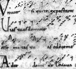 Origem: A Música na Idade Média Neumas inicais.